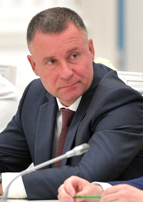 Министр по делам гражданской обороны, чрезвычайным ситуациям и ликвидации последствий стихийных бедствий Евгений Зиничев во время совещании Президента России с новым составом Правительства